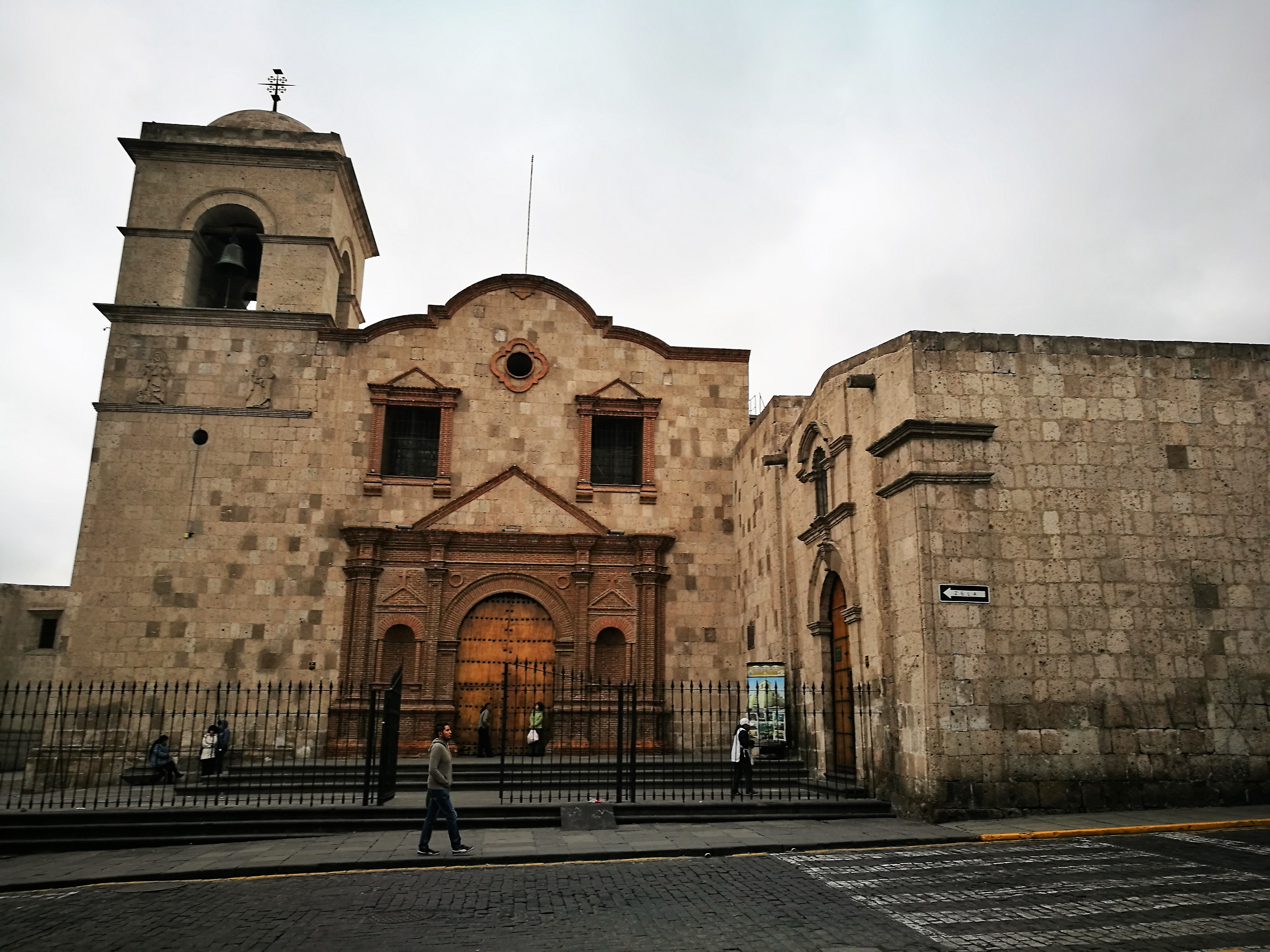 Façana de l'església de San Francisco d'Arequipa